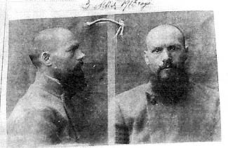 Андрей Илларионович Кузьмин (неверно Козьмин; прозвище Граф; 1880, Барановичи — 1920, Новониколаевск) — прапорщик, революционер, «президент» Красноярской республики (1905), помощник начальника Петроградского военного округа в 1917 году.